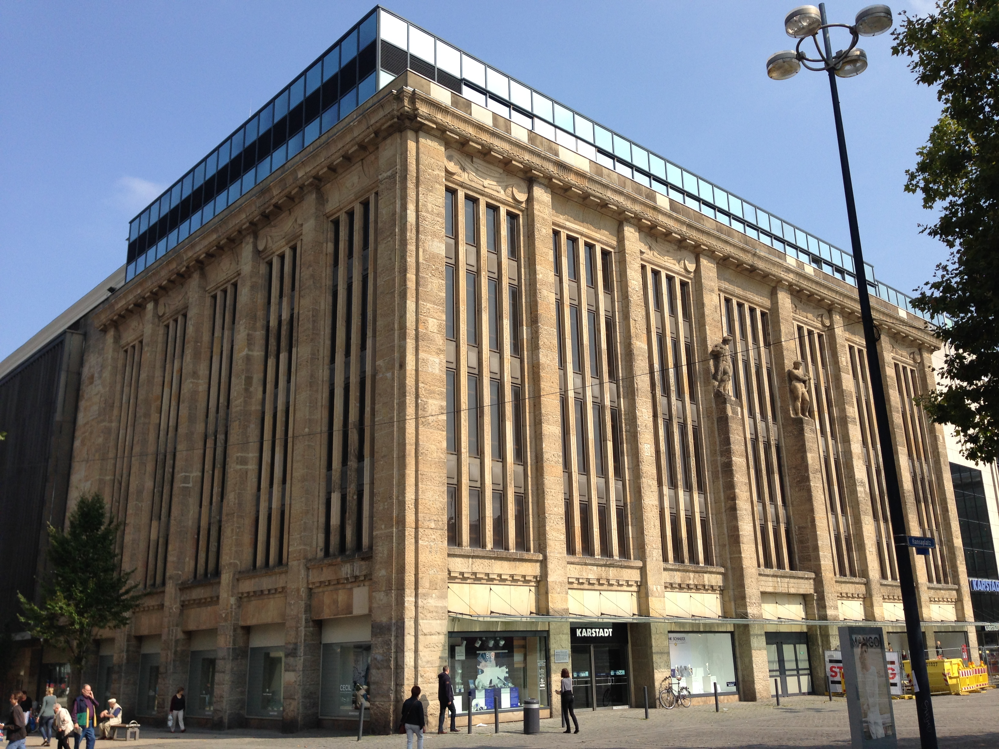 Nordfassade Kaufhaus Althoff 1904 This is a photograph of an architectural monument. 0392